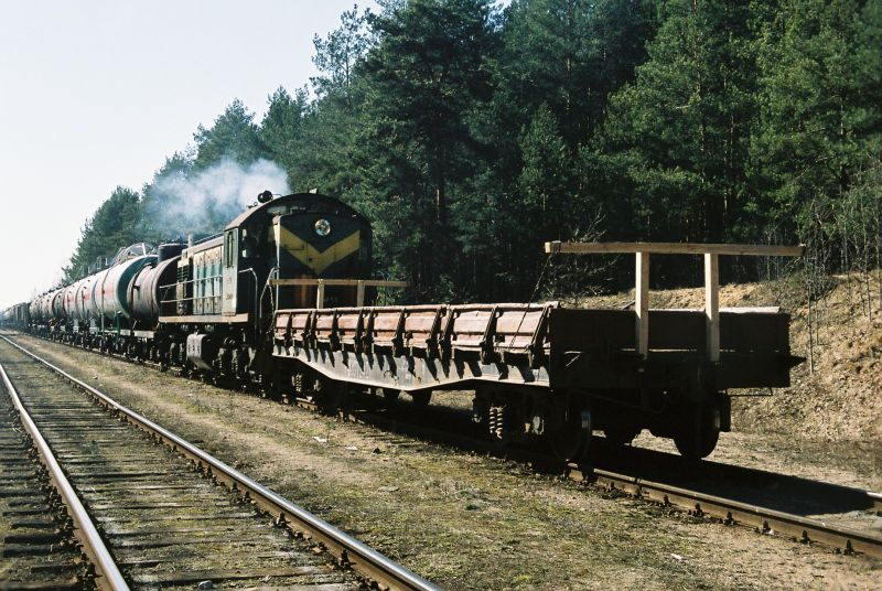 lok. SM48 ze składem szerokotorowych cystern na stacji Zabłotczyzna